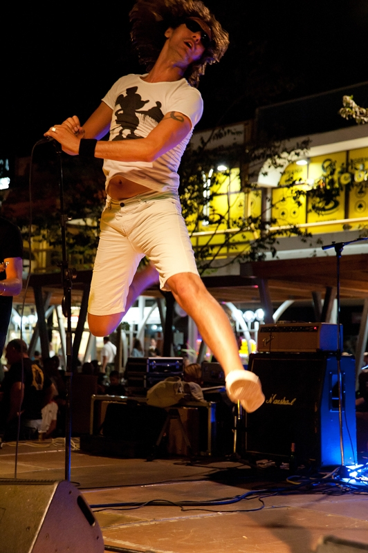 Davor Gobac i Psihomodo pop